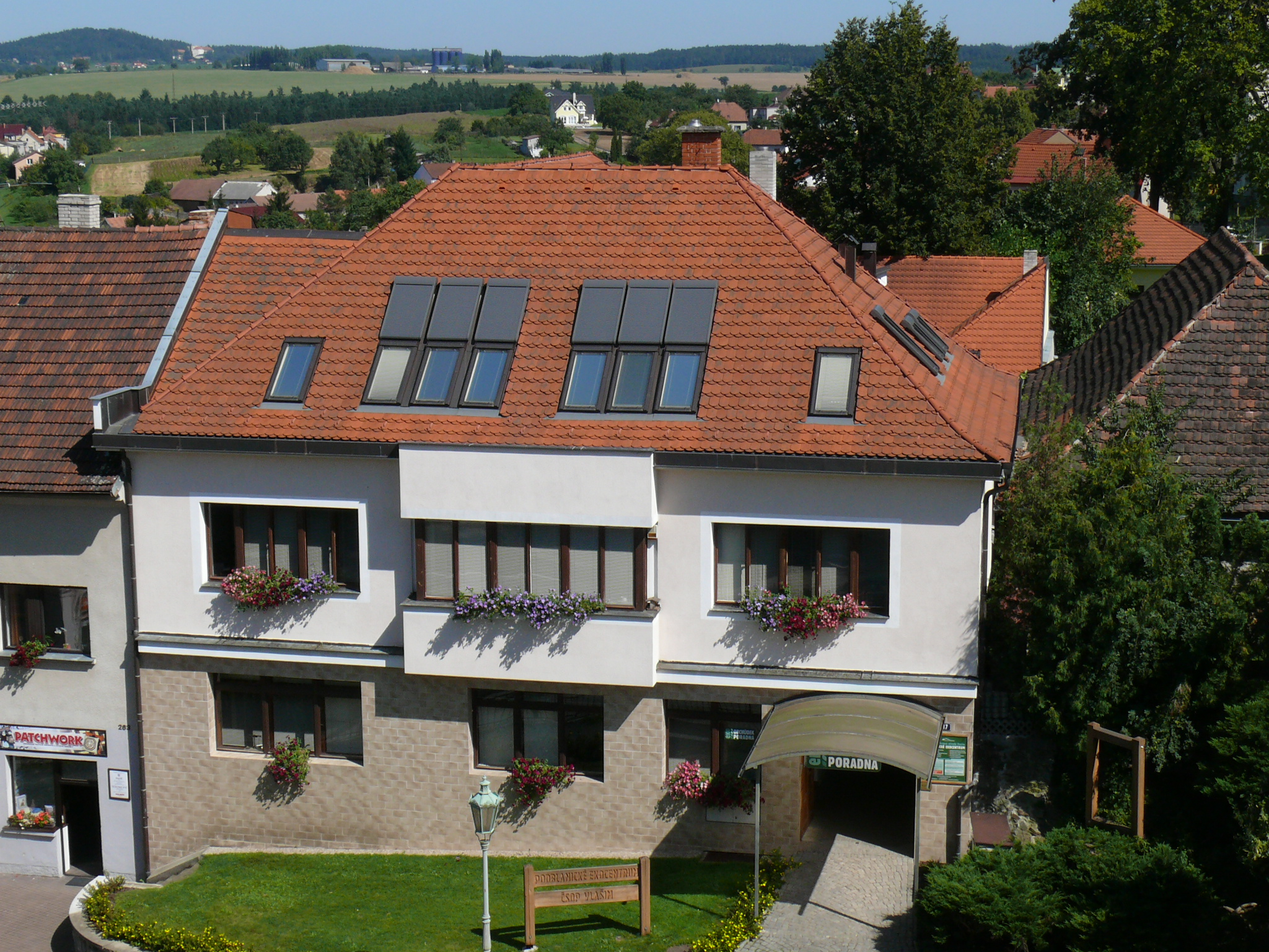 Fotografie Podblanického ekocentra ve Vlašimi.